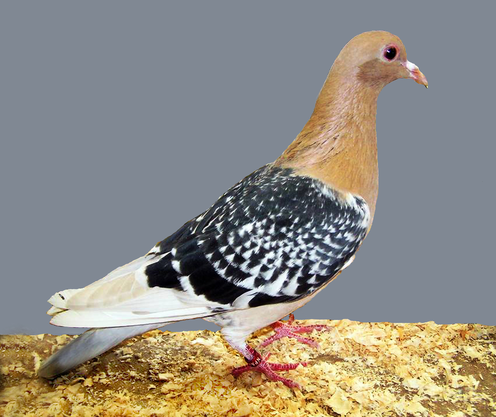 Nuremburg Lark (Checquer)